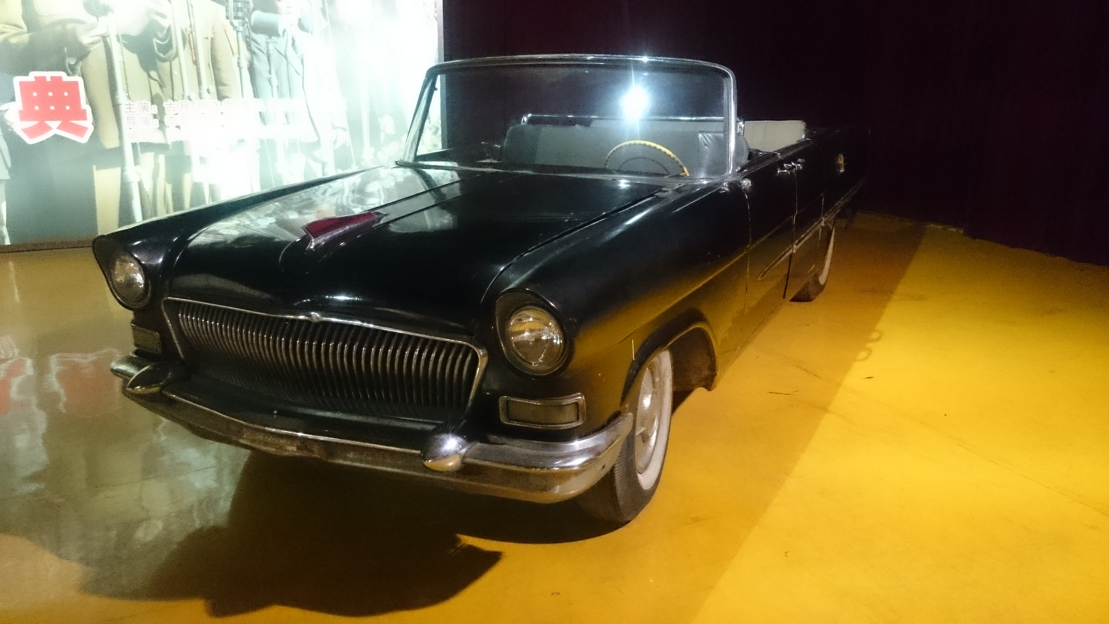 红旗牌敞篷轿车，存于长春长影世纪城。